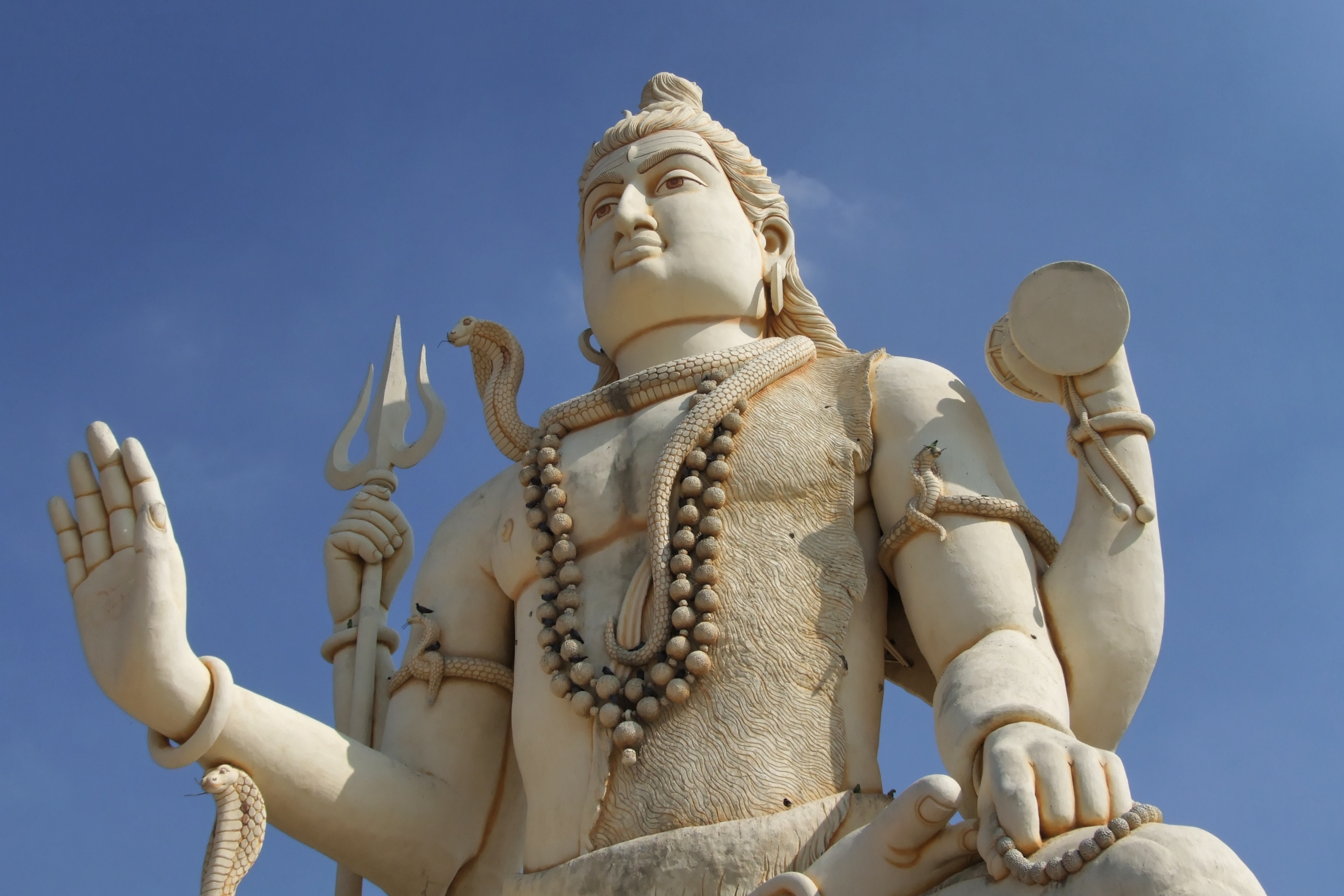 Nageshwar Mahadev, Shiva Temple, Gujarat - India